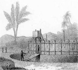 Beschreibung: Befestigter Ort auf Tonga, Stich von 1830 Quelle: Lizenz: gemeinfrei, da abgelaufen Kategorie:Bild:Bauwerk